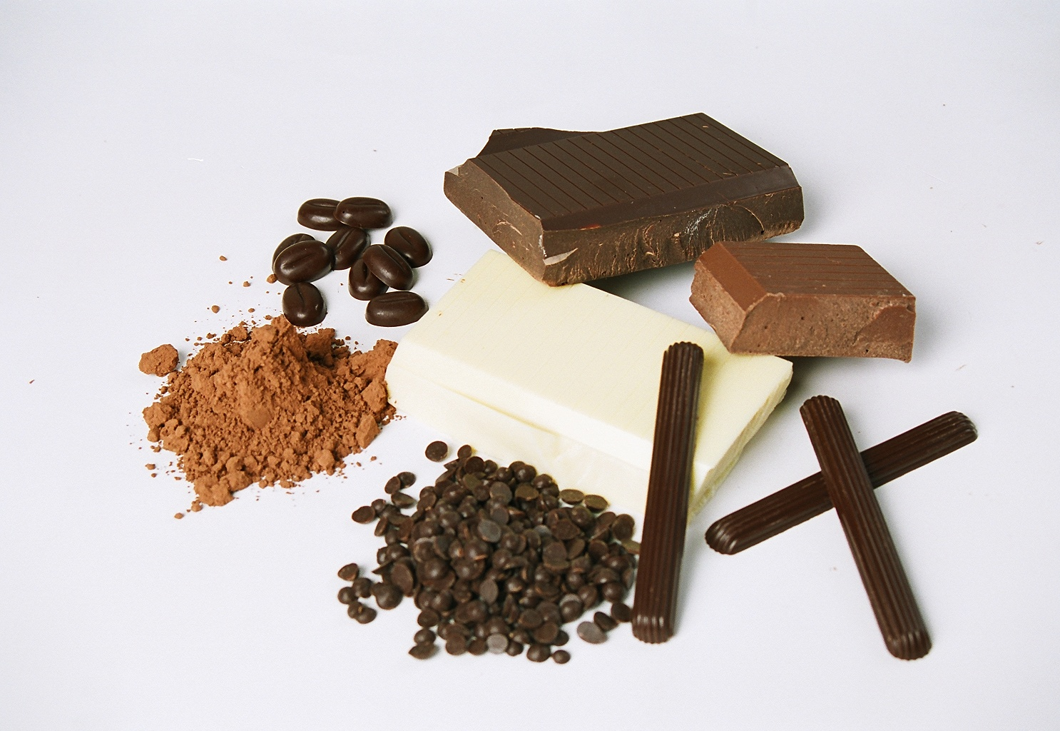 Sôcôla nguyên liệu dùng trong nhà bếp khách sạn